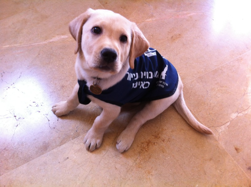 גור נחיה ישראלי